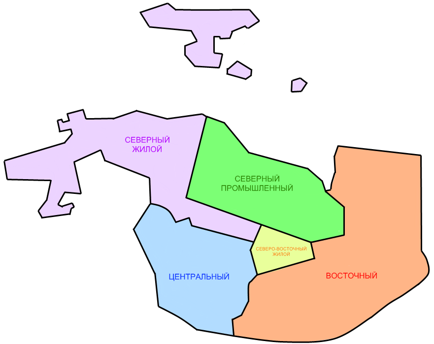 районное деление